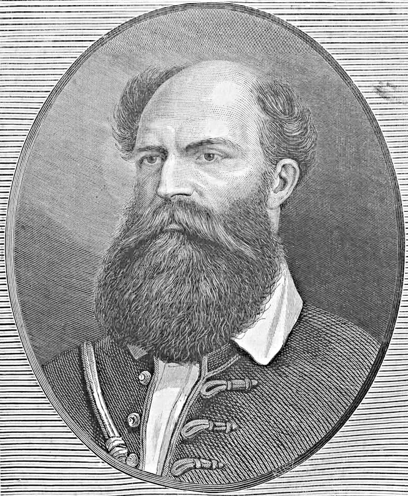 Batthyány Lajos (Vasárnapi Ujság, 1870. június 5.)